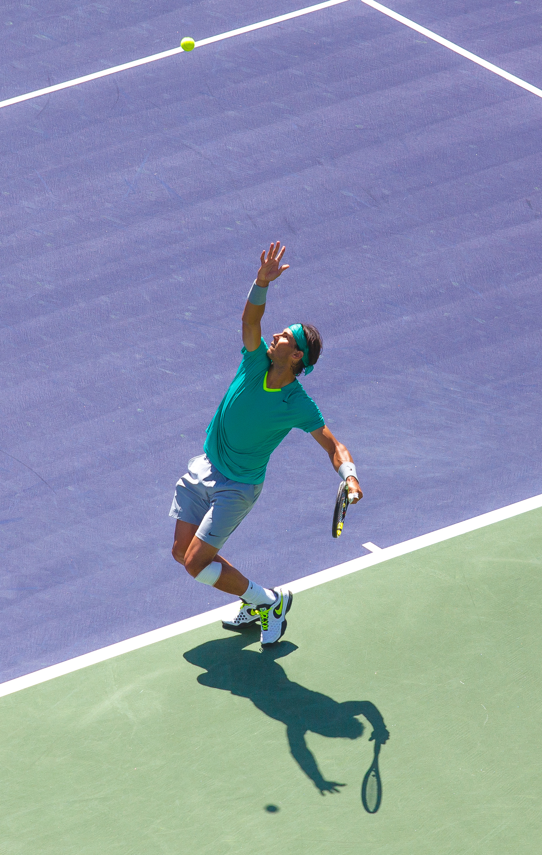 2013 BNP Paribas Open - Rafael Nadal vs Tomáš Berdych (semifinal)